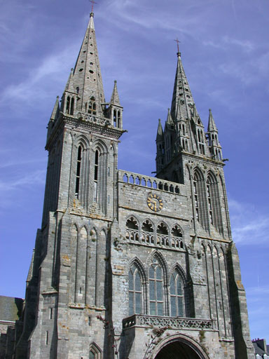 Saint Pol de Léon - La cathédrale Saint-Paul Aurélien